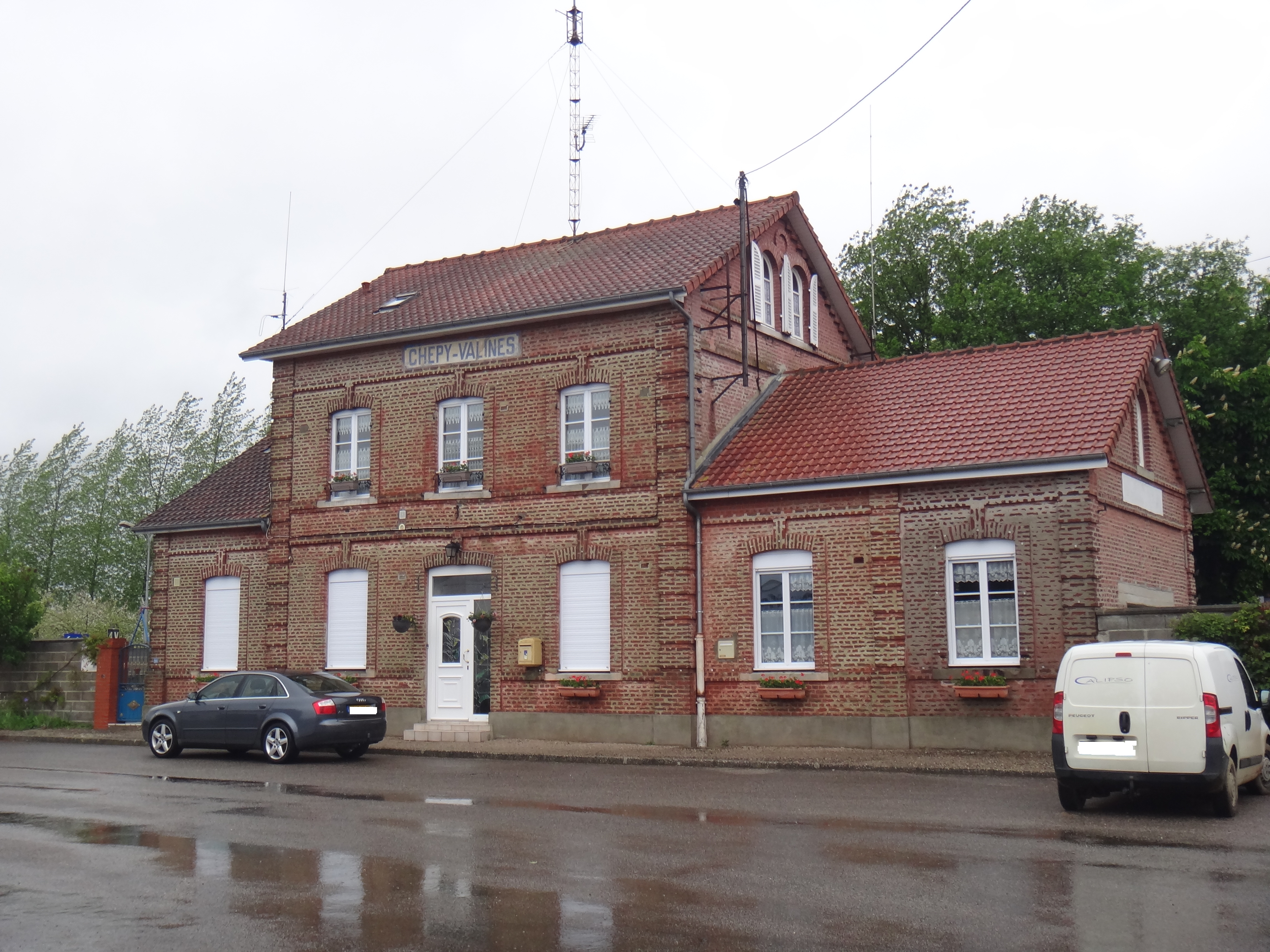 Gare de Chépy - Valines, Somme, Picardie, France, en mai 2014.